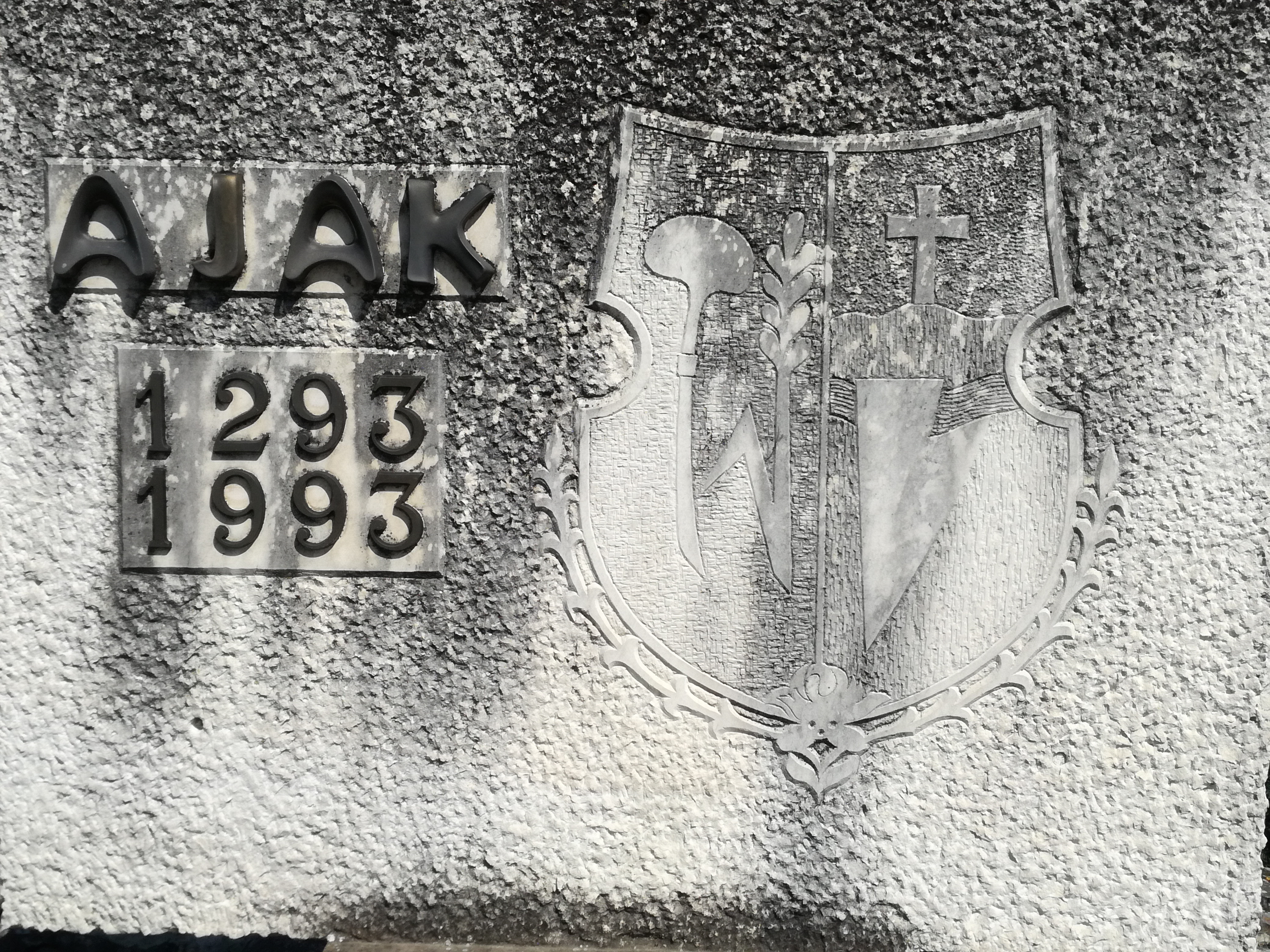 Jubiläumsstein